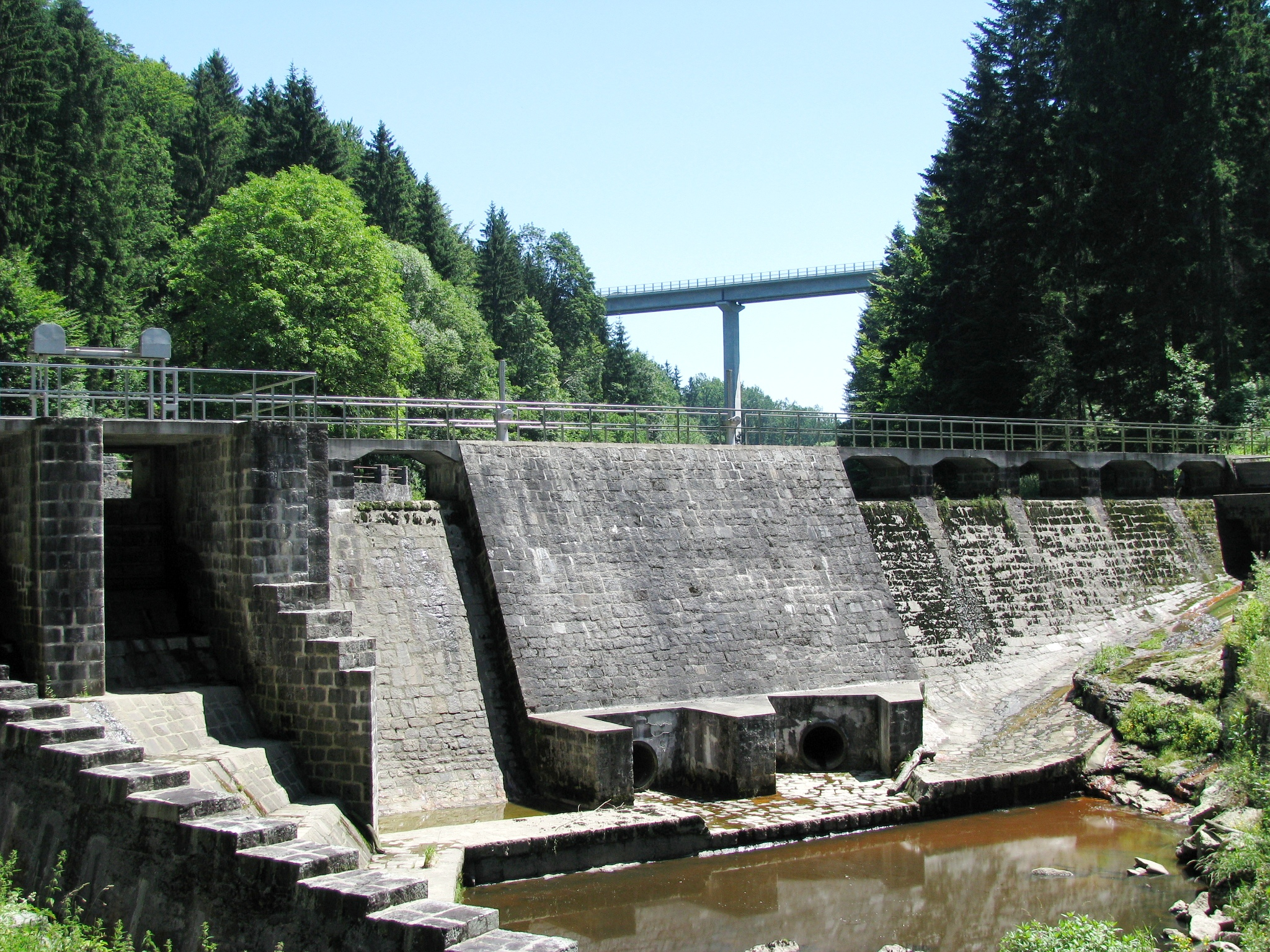 Mauer des Stausees Freyung mit Brücke der Bundesstraße 12